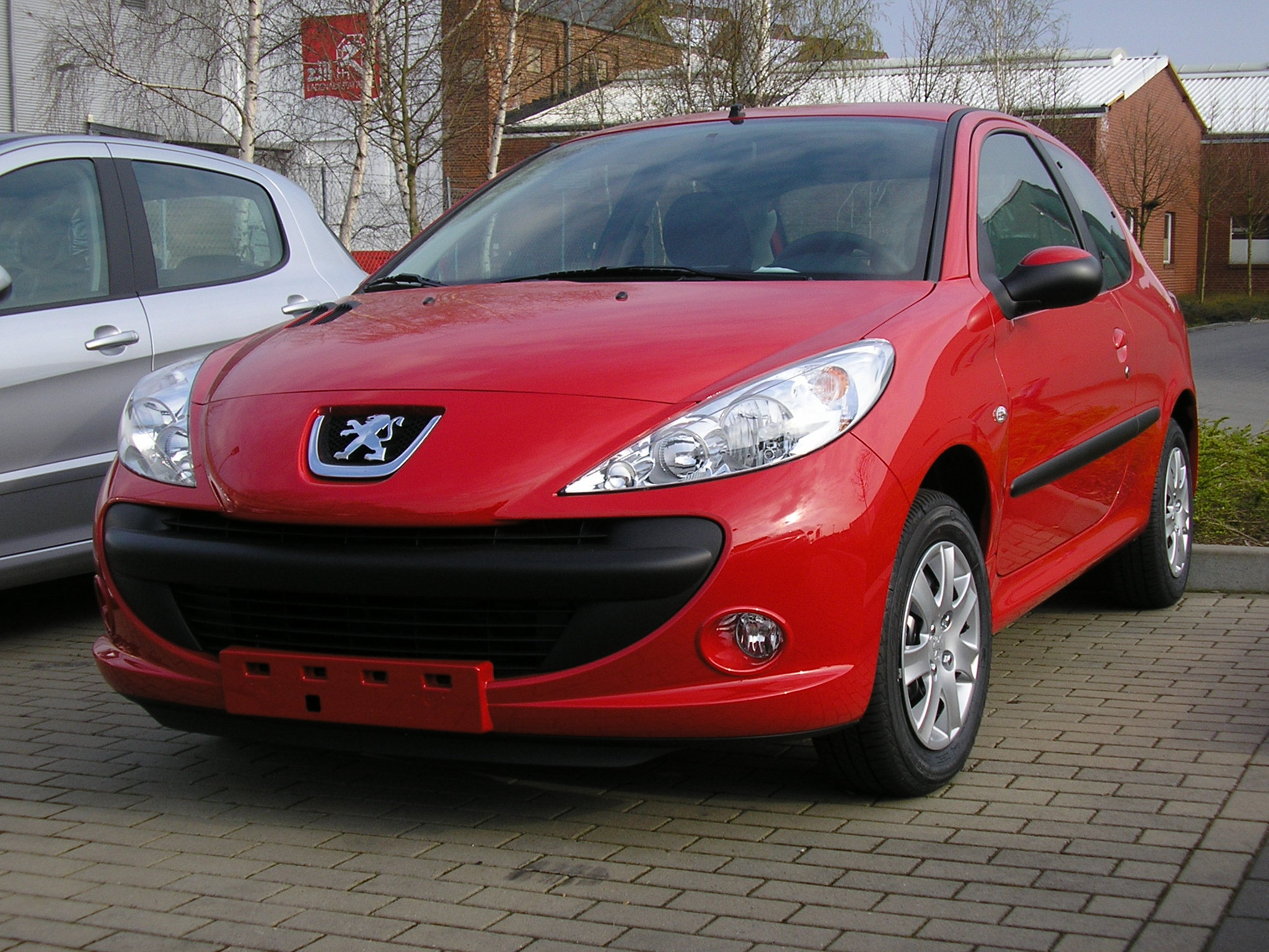 Peugeot 206+ (ab März 2009) Frontansicht